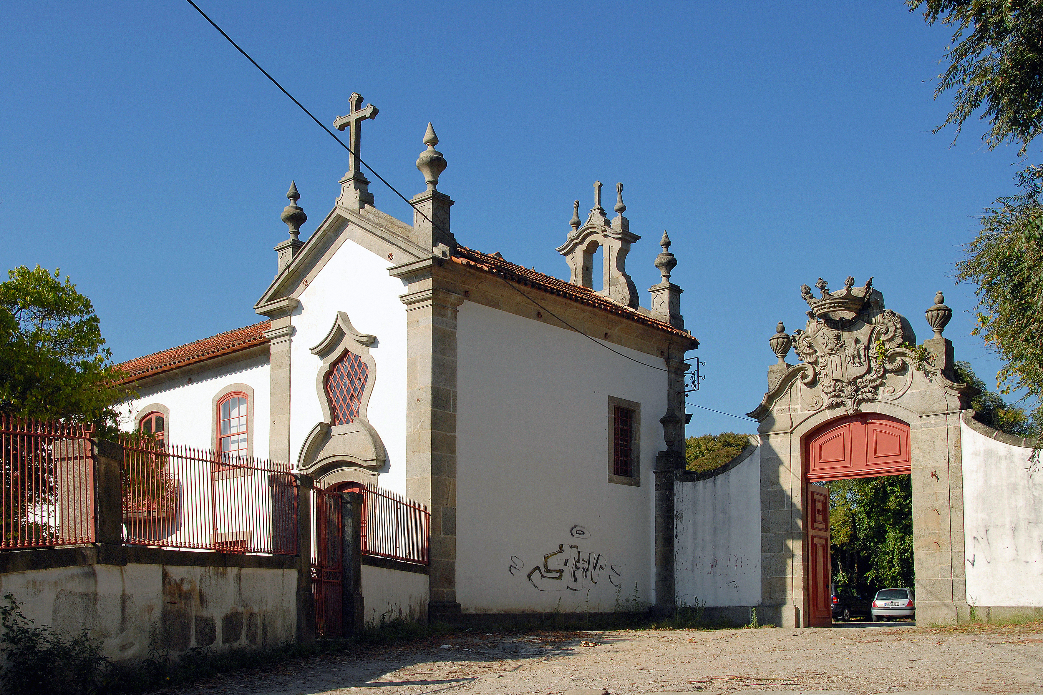 Casa e Quinta da Revolta, hoje inserida no Horto do Freixo